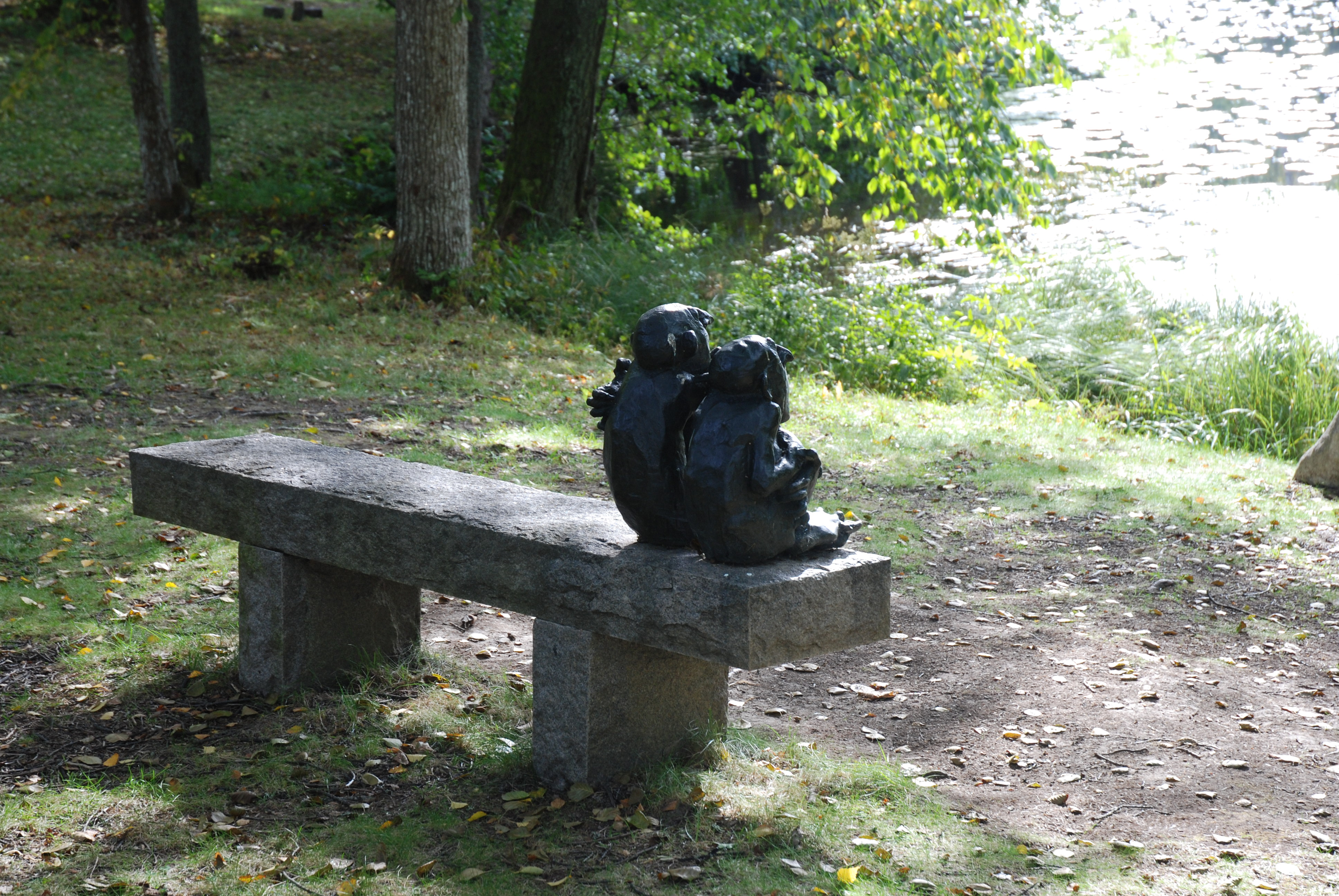 Sture Collin´s Filosofiska bänken (Philosopical bench), Skulturparken Ängelsberg (Ängelsberg Sculpture Park), Ängelsberg, Sweden